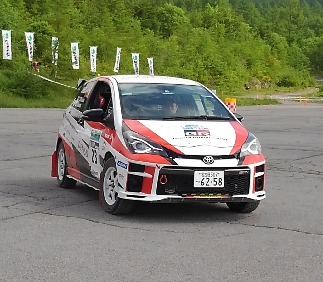 全日本ラリー選手権にて、眞海知志/安藤裕一のトヨタ・ヴィッツGRMN